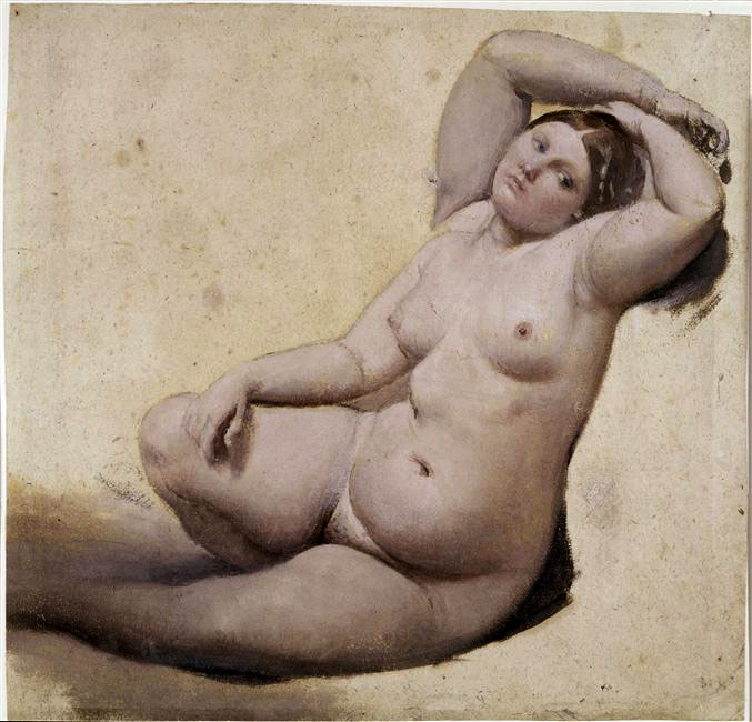 Ingres, la Femme aux trois bras étude pour le Bain turc musée Ingres Montauban